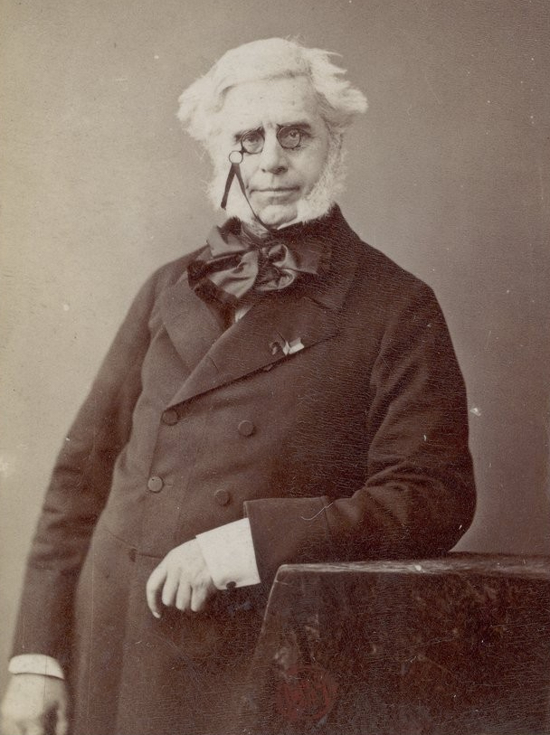 Charles Laffitte (1803-1875), financier, neveu de Jacques Laffitte